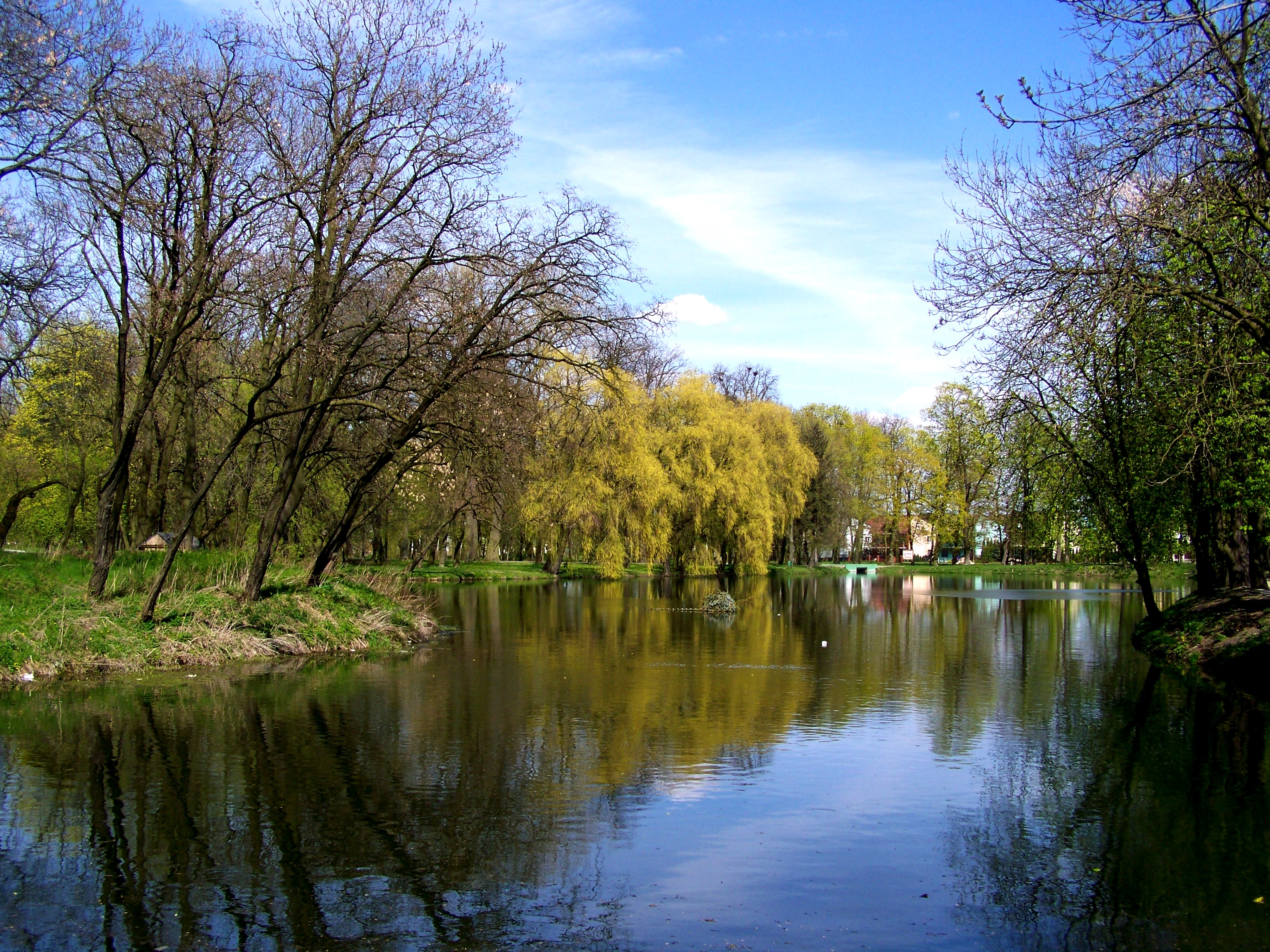 Staw Przy Domu Miłosierdzia im. Jana Pawła II w Sokołowie Podlaskim